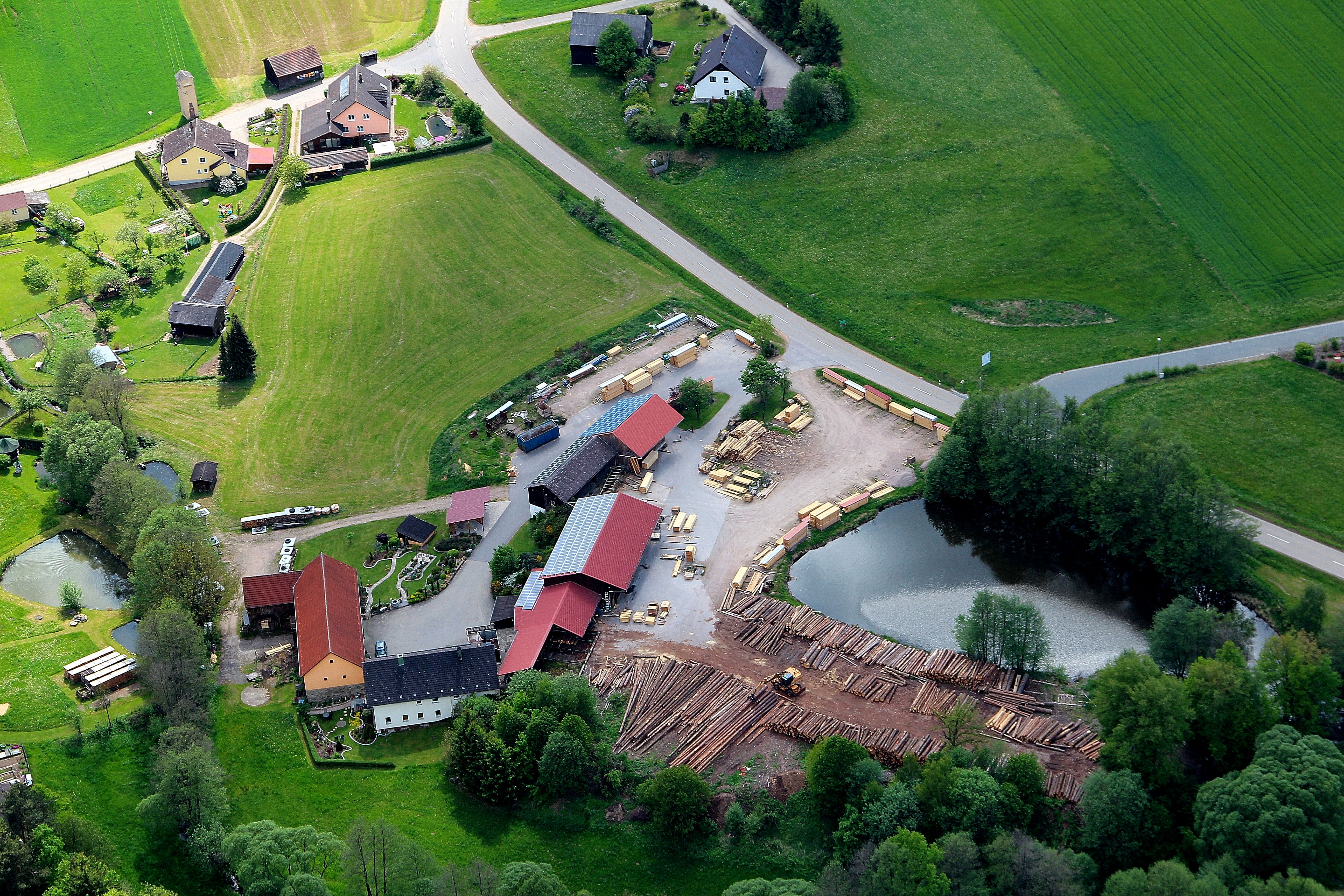 Boxmühle, Gemeinde Gleiritsch, Landkreis Schwandorf, Oberpfalz, Bayern